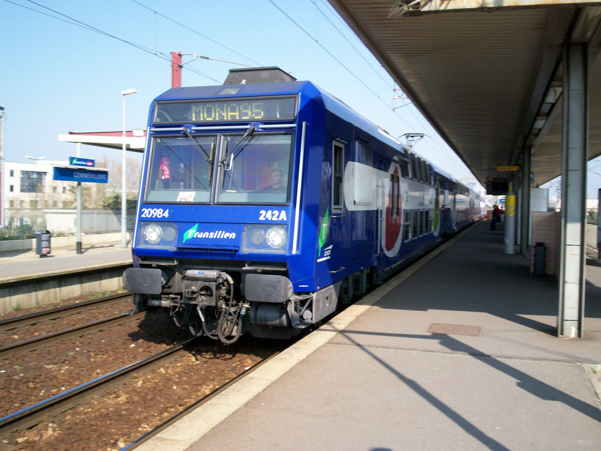 Z20900 Code Mona à Gennevilliers